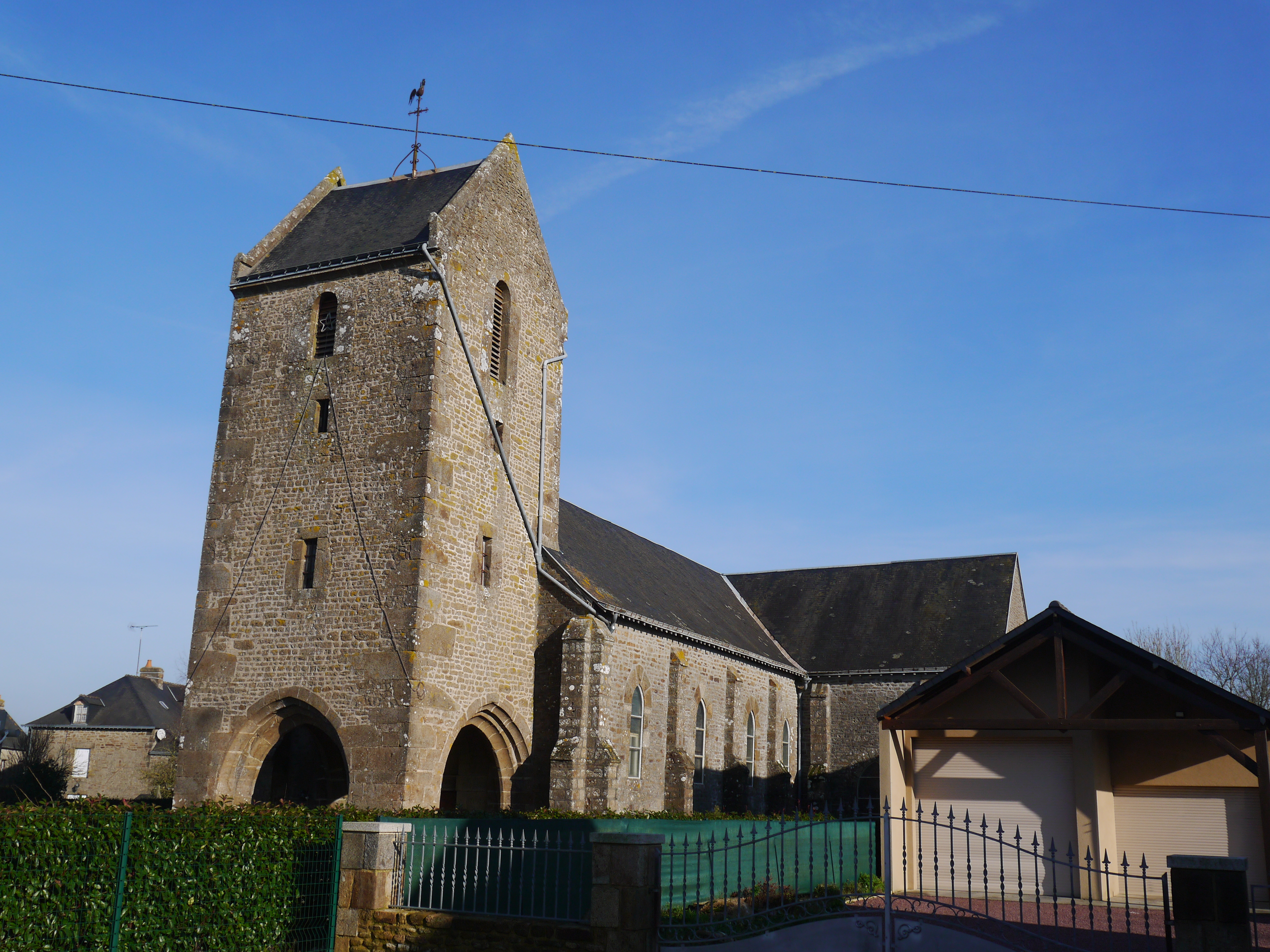 L'église Saint-Julien.